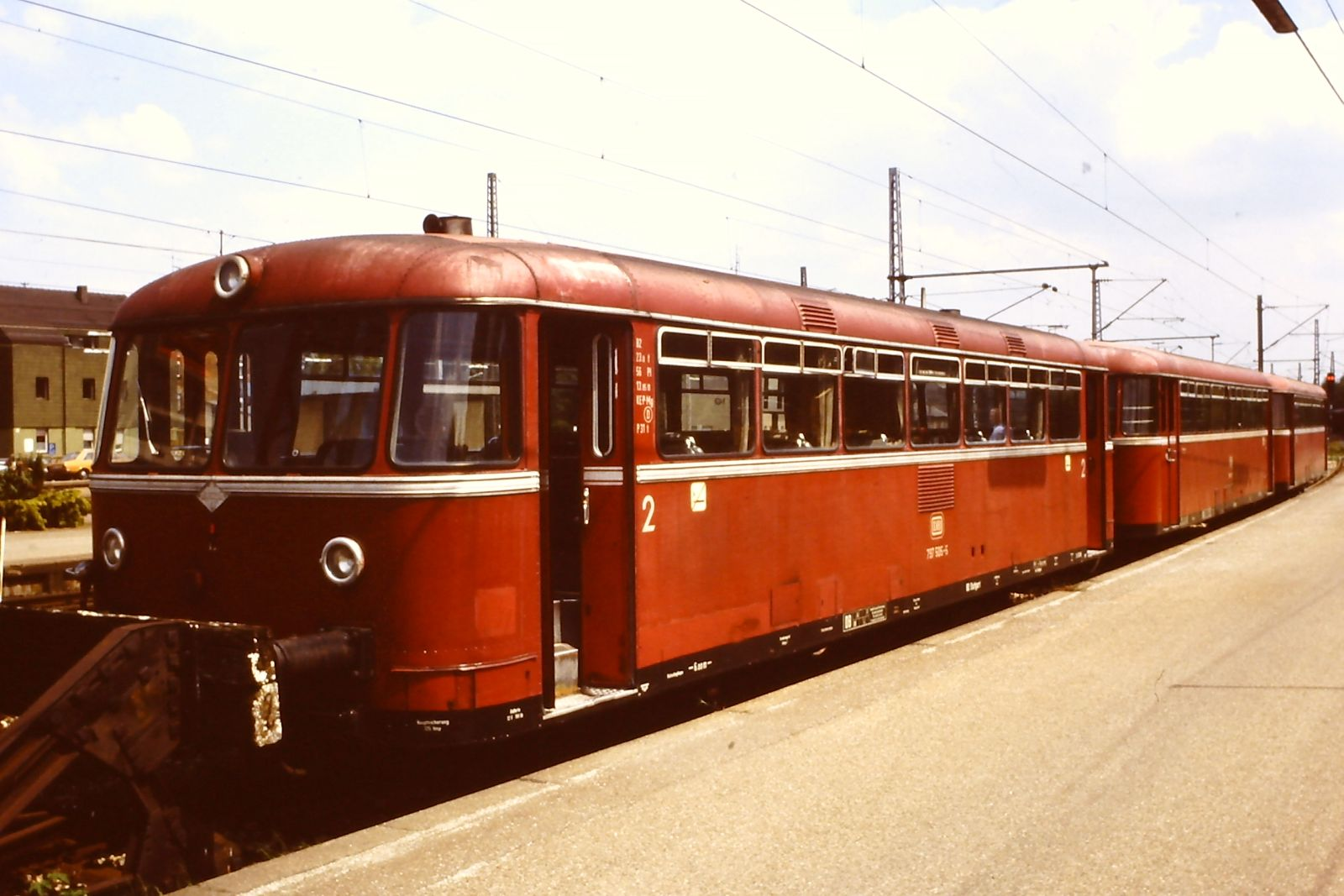 DB Baureihe 797 in Göppingen Archiv-Nr. 102/05